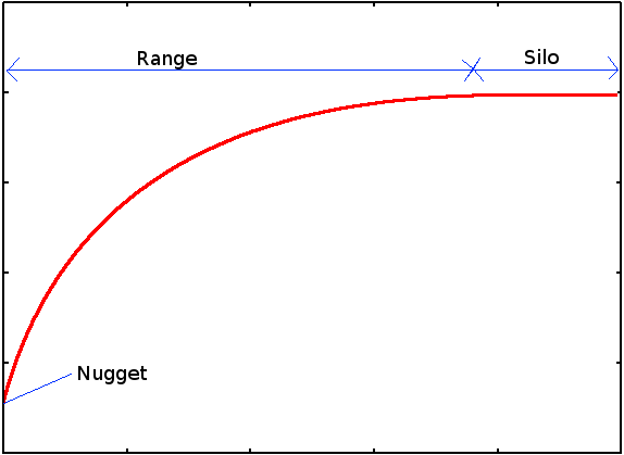 exemplo de variograma com sill, nugget e range